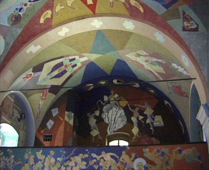 "Innenansicht auf die Ostwand der Josefikirche zu Schwanberg"